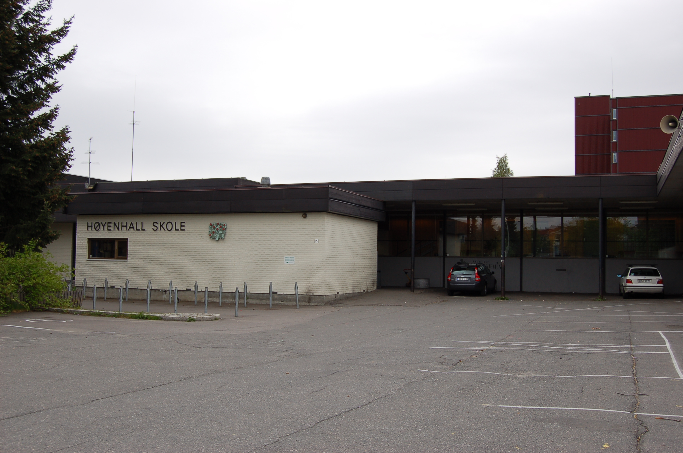 Høyenhall skole i Oslo